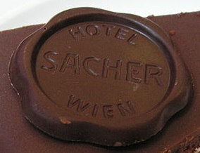 Sacher-torta a Hotel Sacher pecsétjével